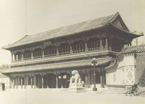 中南海新华门